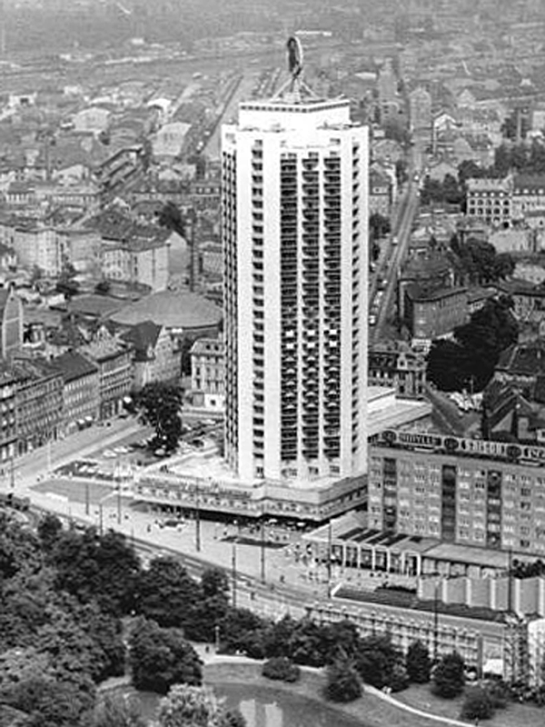 Leipzig, Wohnhochhaus ADN-ZB Gahlbeck 24.9.77 Leipzig: Blick auf Leipzig aus der Vogelperspektive. Im Mittelpunkt sieht man das moderne Wohnhochhaus an der Wintergartenstraße und den Schwanenteich. (Achtung! Veröffentlichung mit Angabe der Nummer ZLD-L 0470-77)